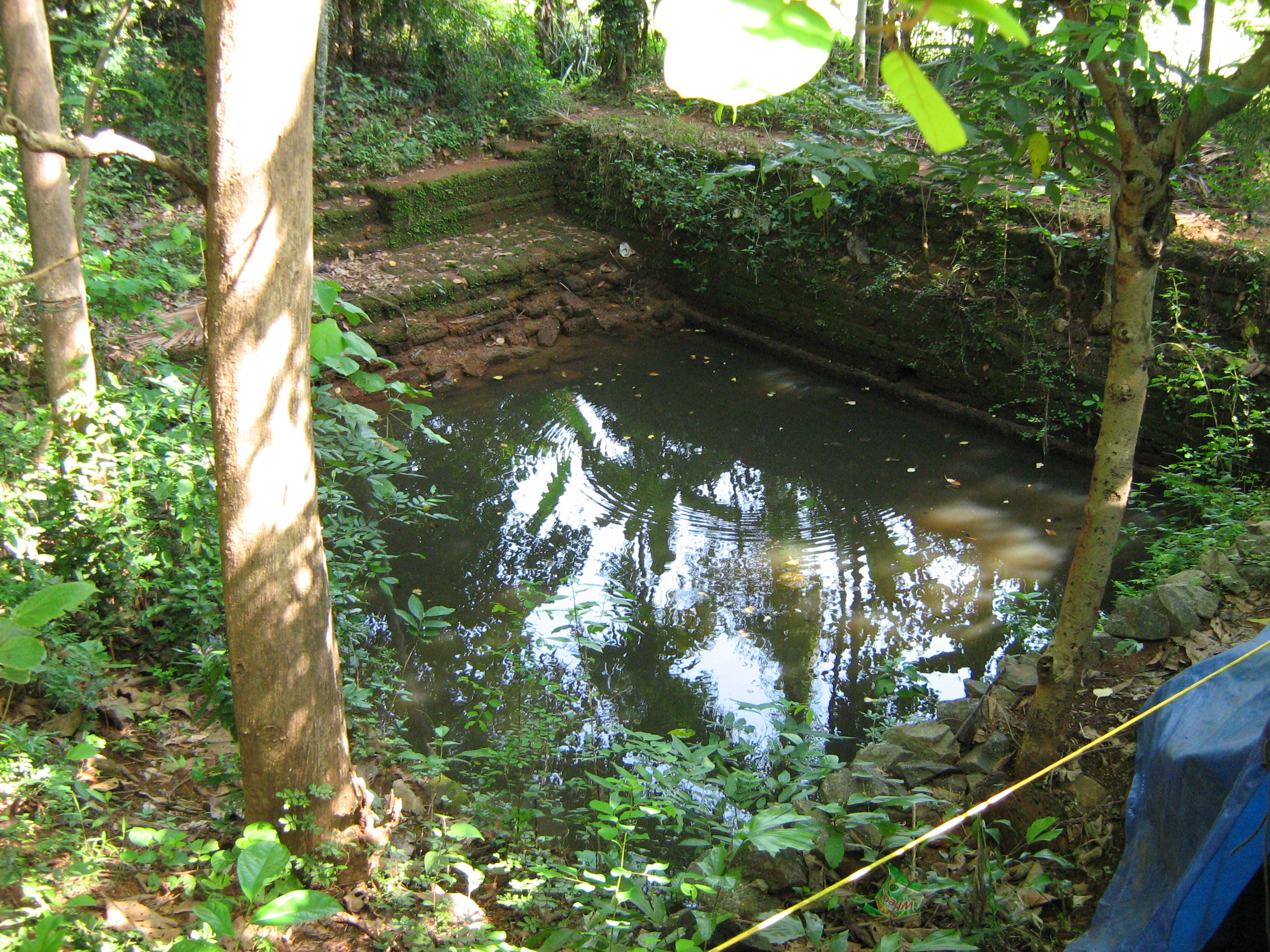 തേനേഴി മനയിലെ കുളം, കുറുവട്ടൂര്‍, പാലക്കാട്‌ ജില്ല